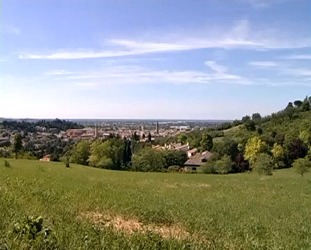 Le colline di Cesena